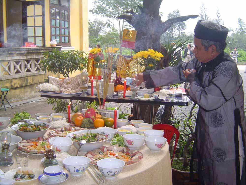 Cúng Tất niên. Ảnh do người truyền lên chụp. Bản quyền thuộc người chụp. Tình nguyện hiến cho Wikipedia. Thể loại:Tết